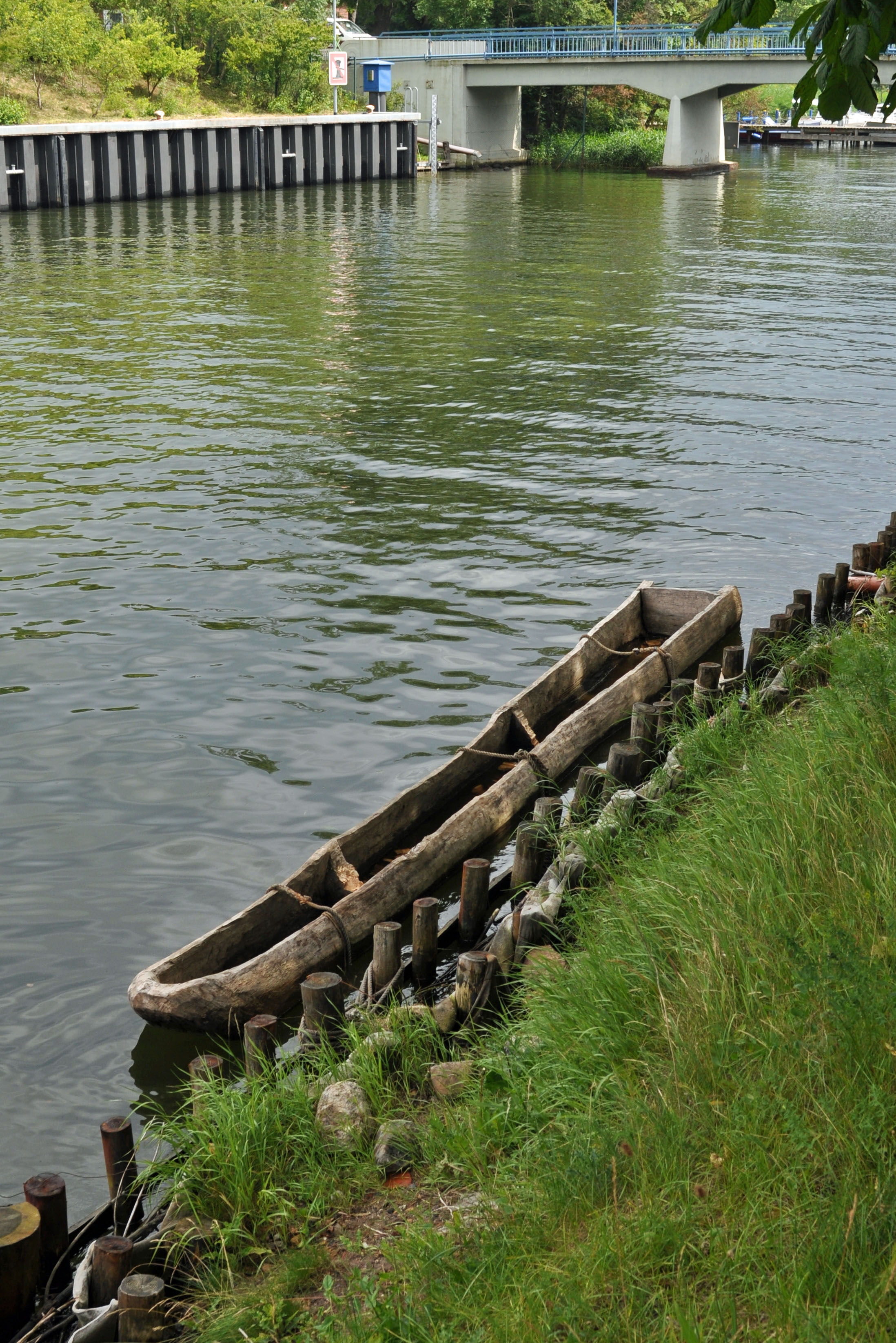 Exponat bzw. Gebäude im Nautineum Stralsund auf dem Dänholm, Stralsund. Einbaum